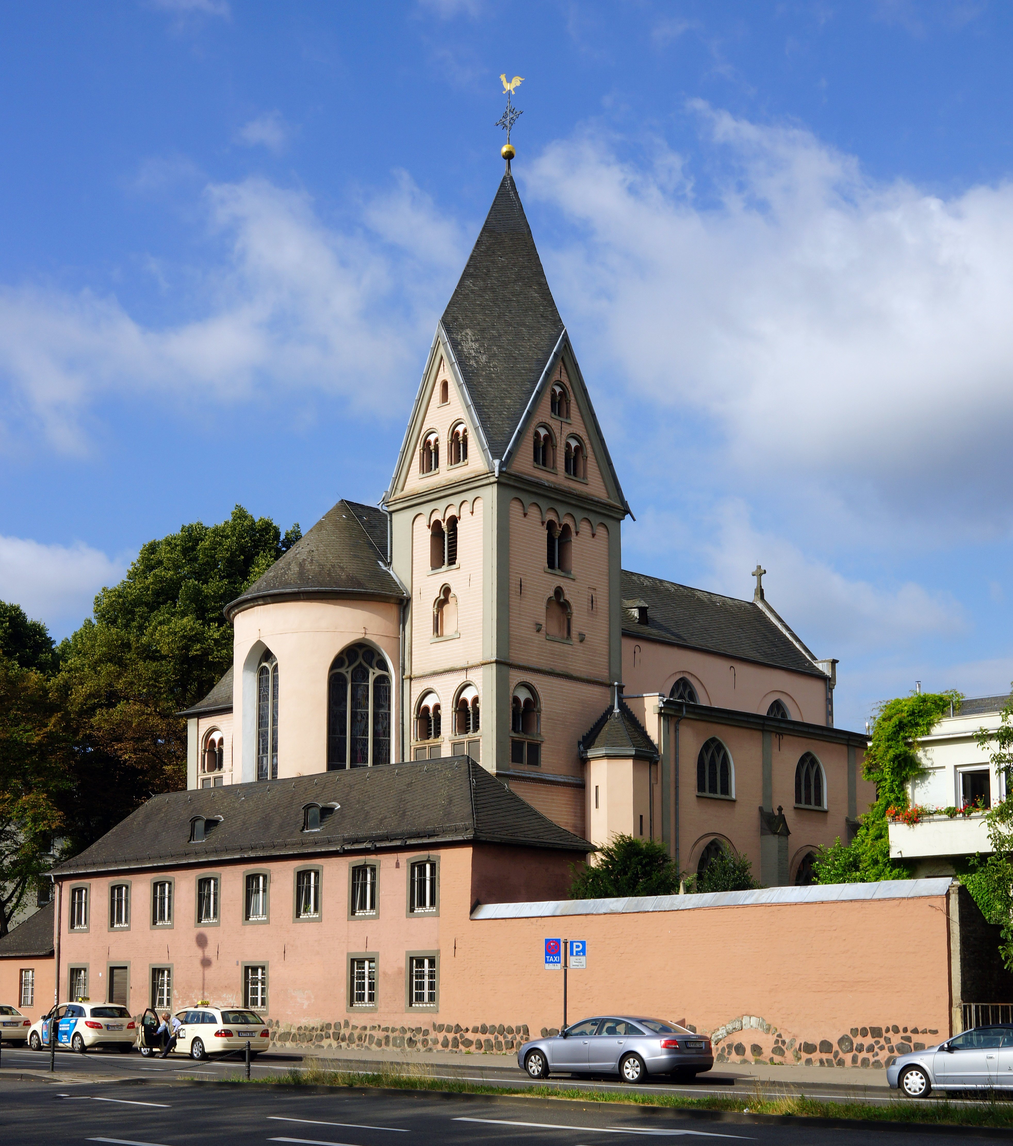 St. Maria in Lyskirchen, Ansicht vom Rheinufer aus This is a photograph of an architectural monument.